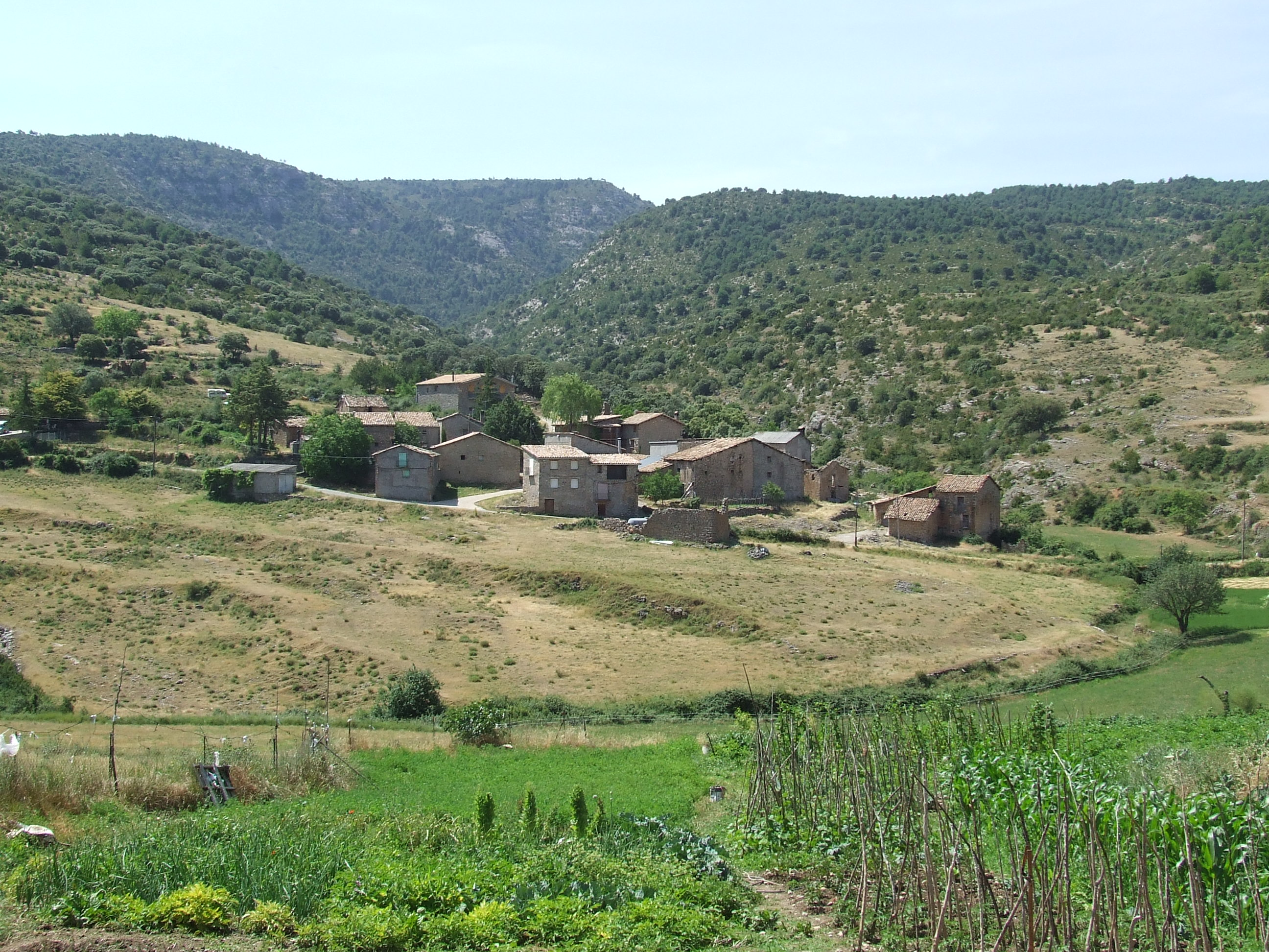 El raval de Segalars, d'Hortoneda (Conca de Dalt, Pallars Jussà)